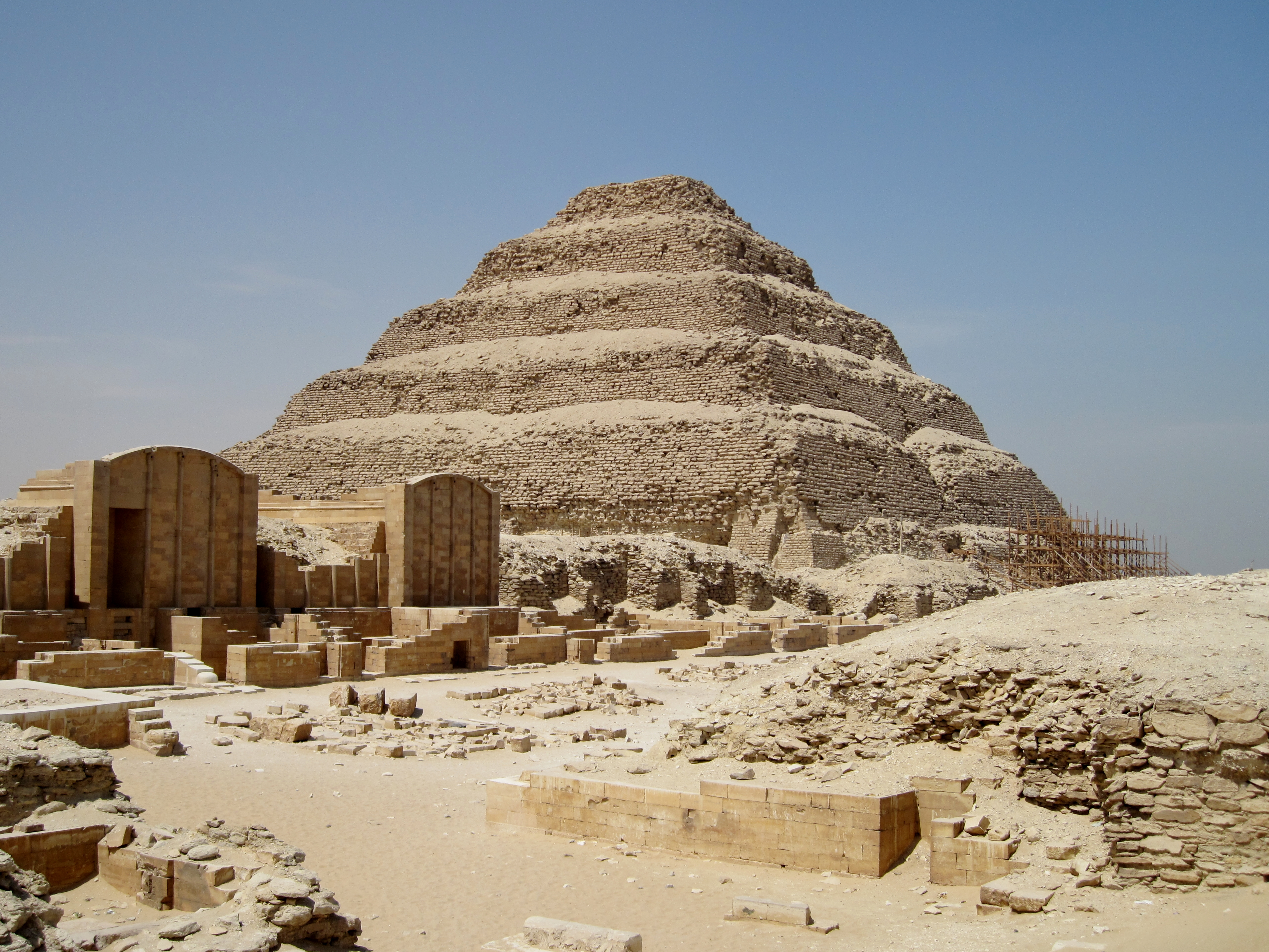 Stufenpyramide des Pharao Djoser aus der 3. Dynastie des Alten Reiches in Ägypten (um 2670 v. Chr.)